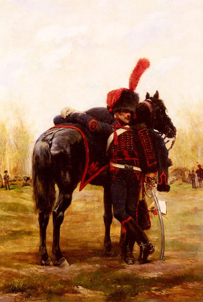 Artillerie à cheval de la Garde Imperiale, Oil on canvas, private collection.